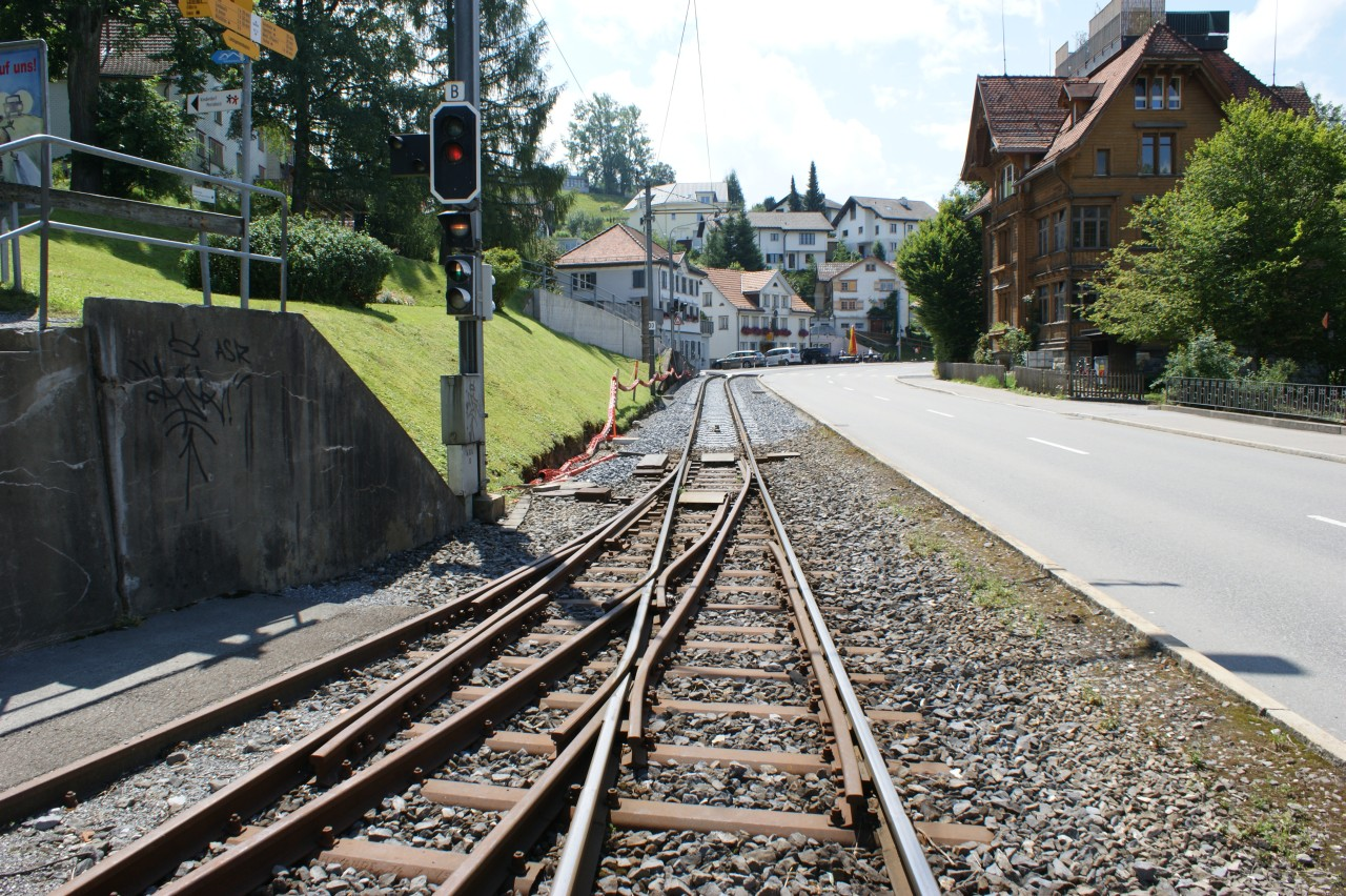 Bahnhof Trogen, Einfahrweiche